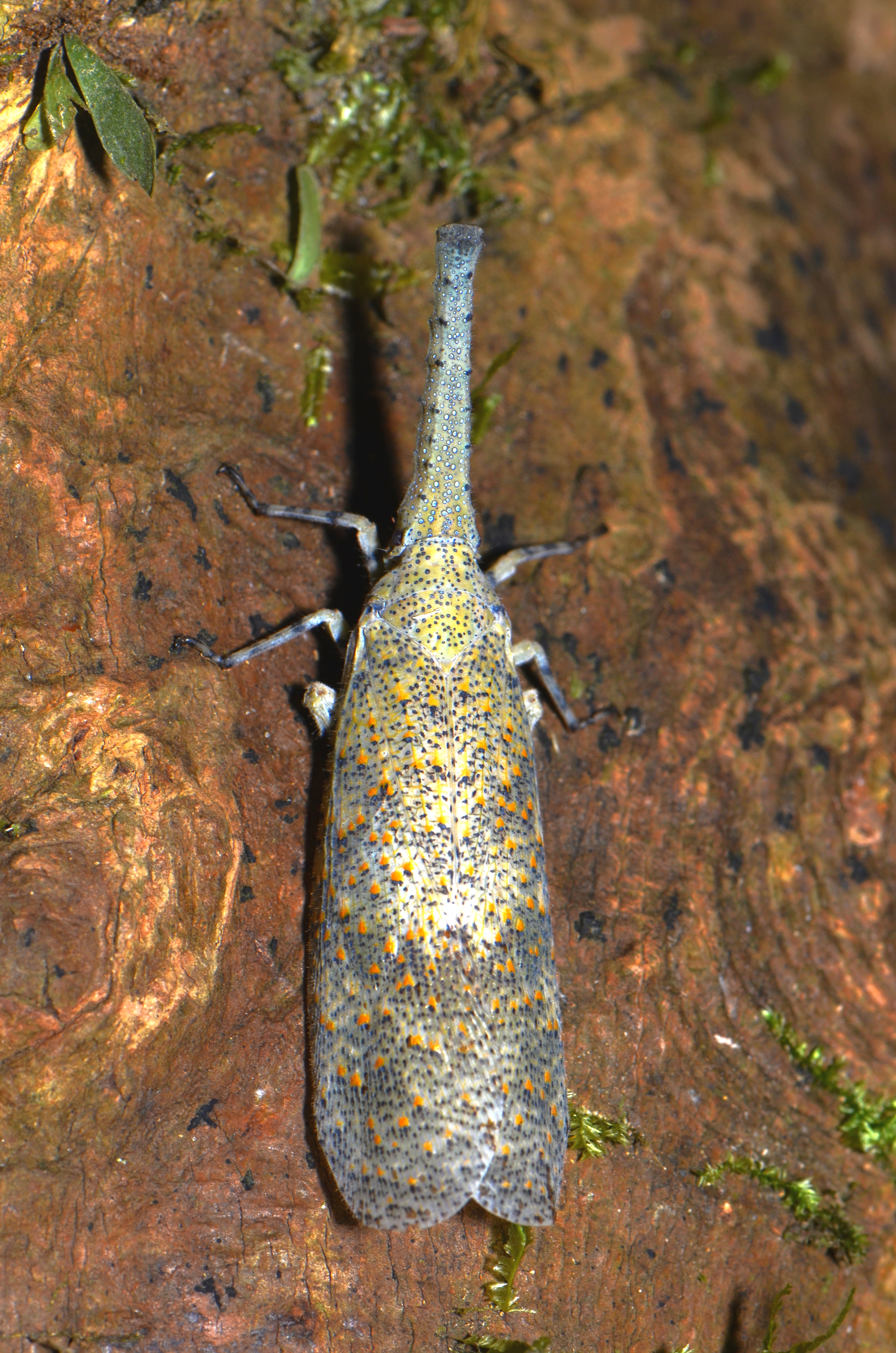 Zanna sp.